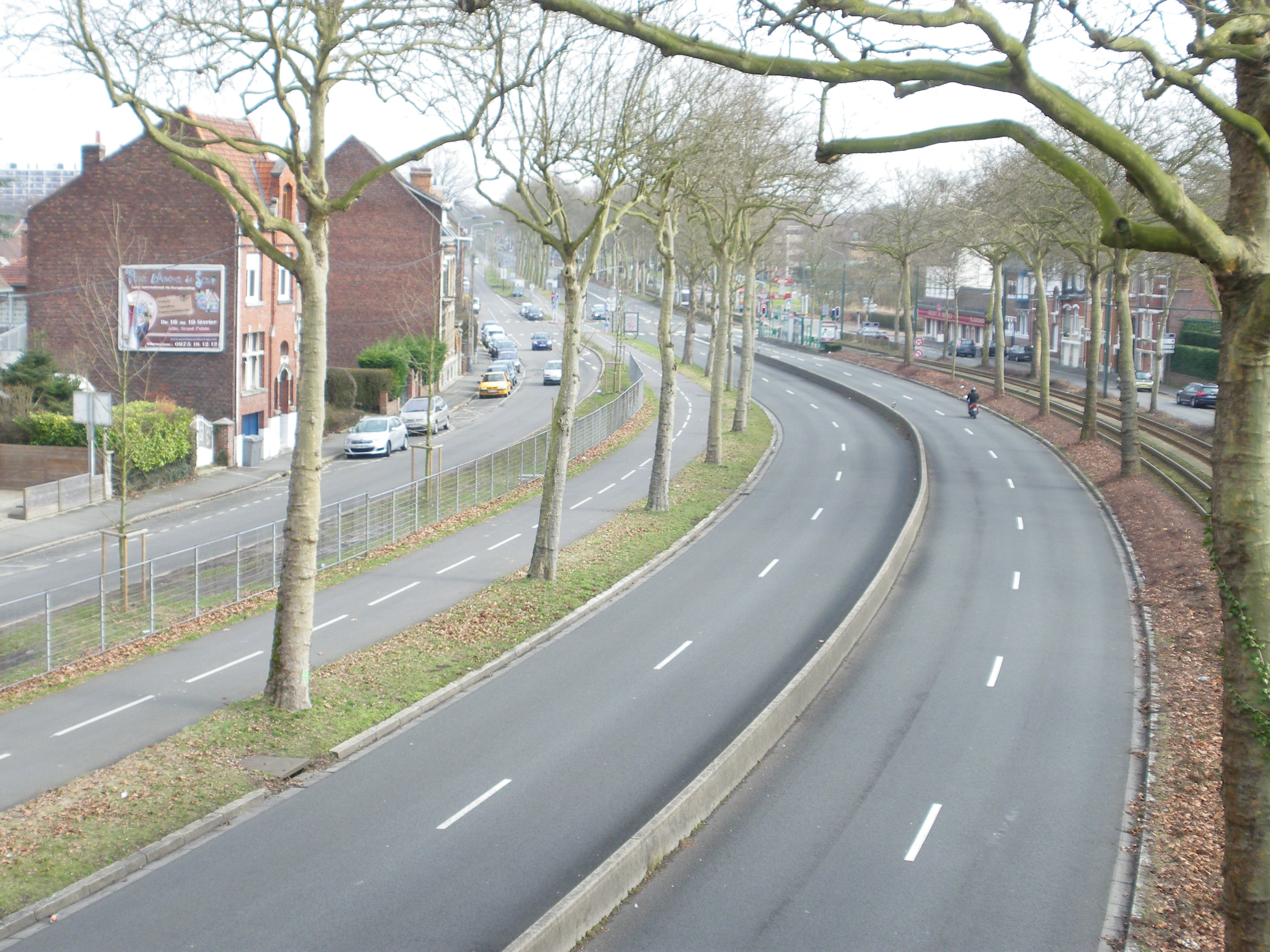 Vue du Grand Boulevard (Avenue de Flandre) de la passerelle de l'Epinette à hauteur de Villeneuve-d'Ascq. La vue est orientée en direction de Roubaix.